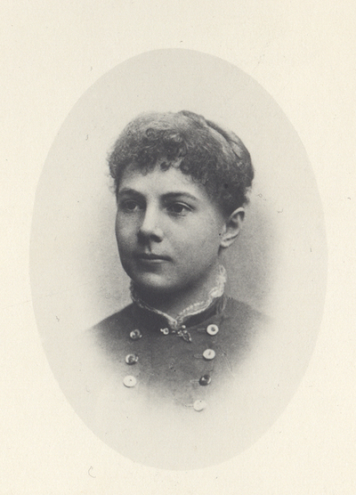 Suomalaissyntyinen Ruotsiin avioitunut Hanna Palme toimi järjestöissä ja oli aikansa naisasianainen, joskin pohjimmiltaan konservatiivi